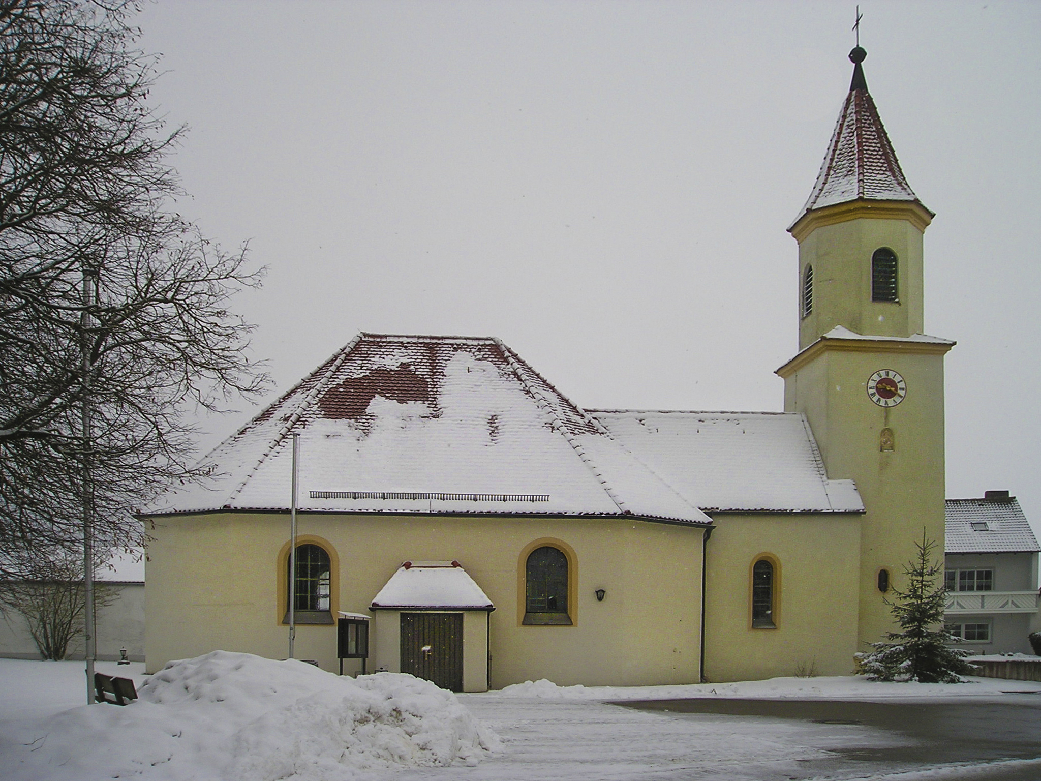 Kirche St. Sebastian und St. Anna in Sappenfeld, Gemeinde Schernfeld im Landkreis Eichstätt (Bayern)